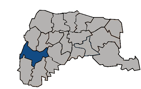 台灣省雲林縣四湖鄉 KaurJmeb於2005年1月28日為編輯zh:四湖鄉所繪製